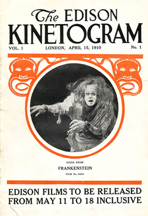 Poster for Frankenstein (film, 1910)